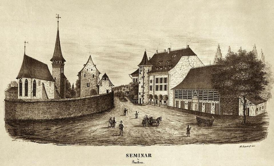 Erstes Berner Lehrerseminar, Schloss Münchenbuchsee BE, Schweiz